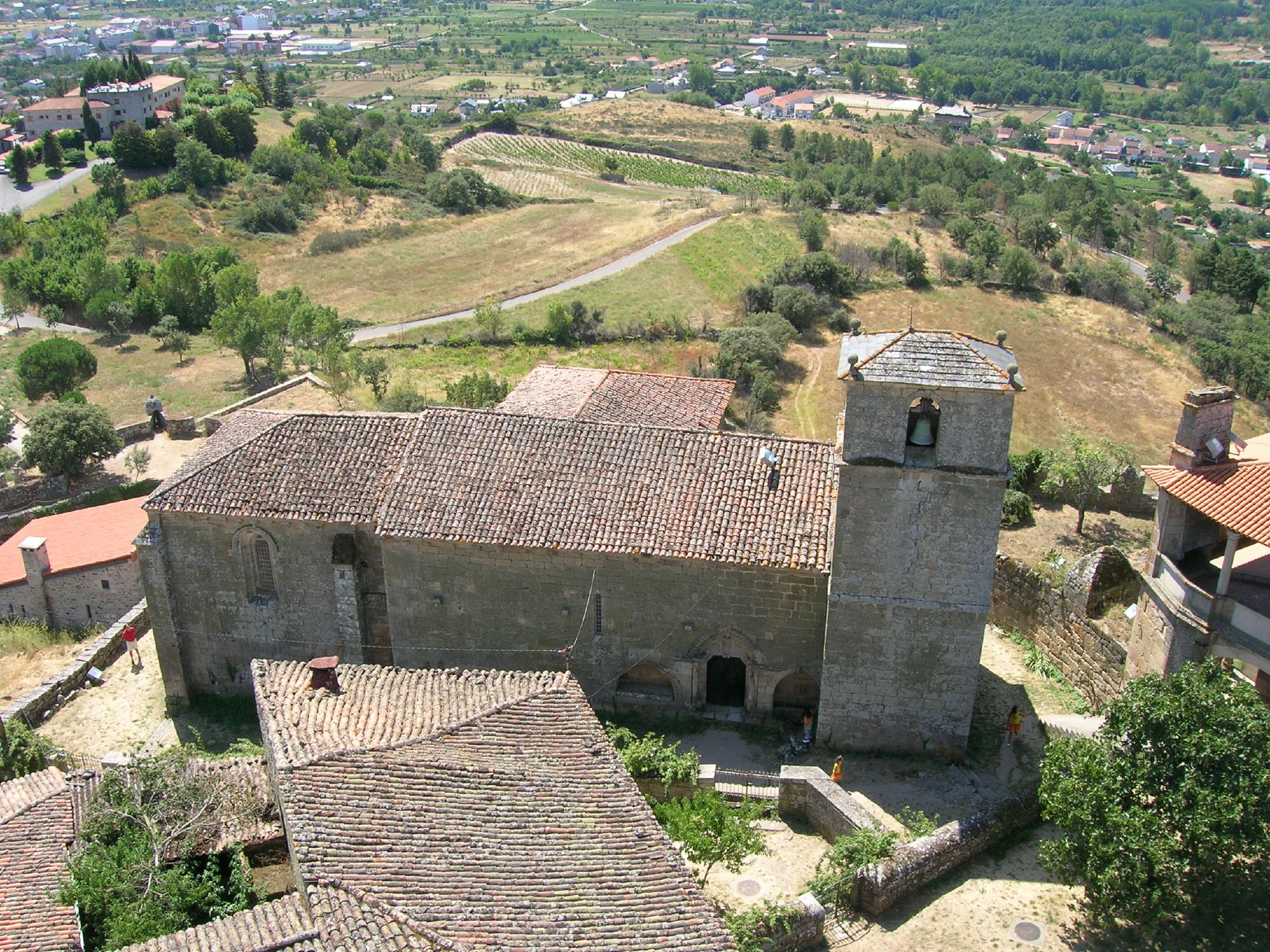 Vista de la iglesia de Santa María de Gracia desde la torre del castillo de Monterrei - Ourense - Galicia - España. En la esquina superior izquierda el Parador Nacional.